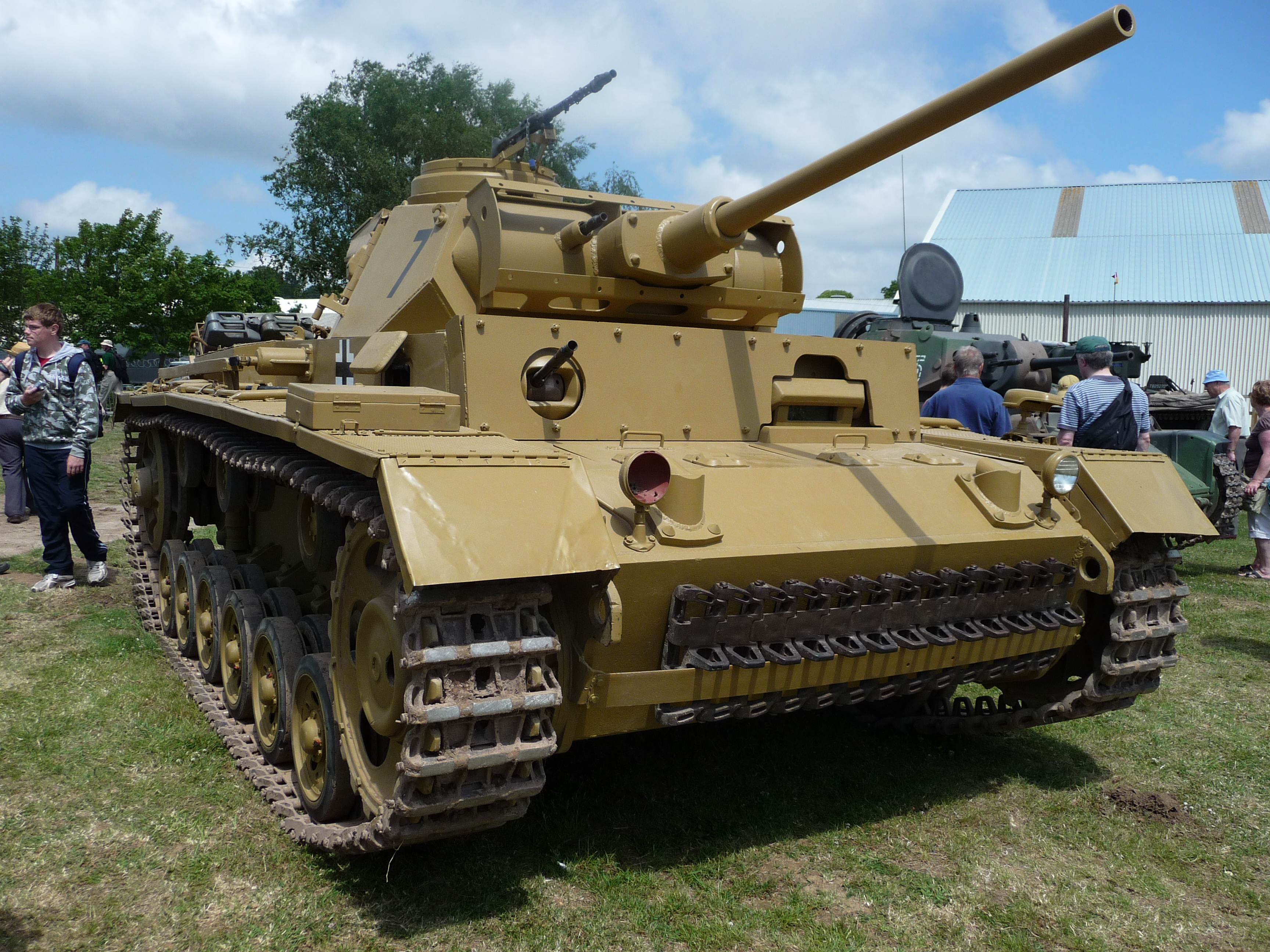 Panzer 3 (III)